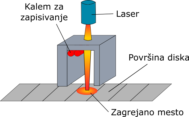 Princip rada tvrdih diskova koji koriste HAMR (Heat Assisted Magnetic Recording) tehnologiju.